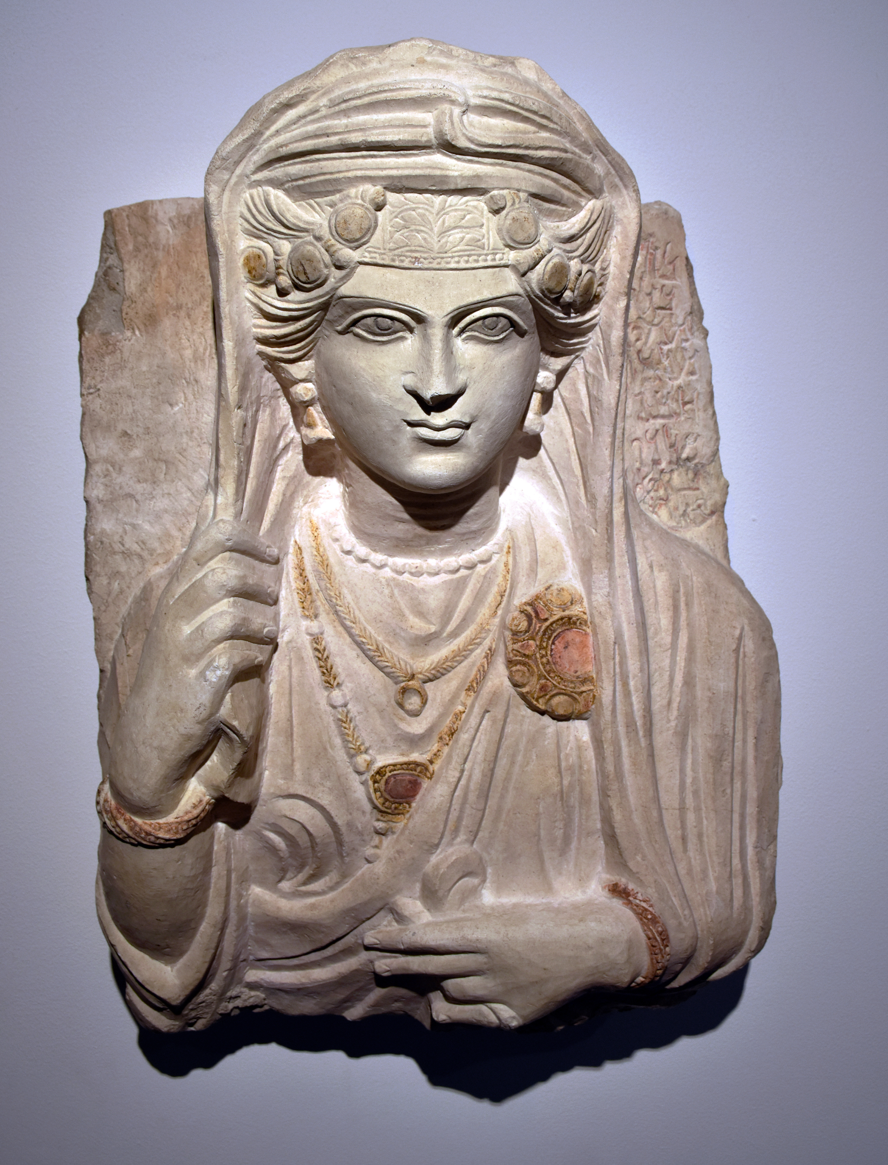 Buste funéraire de Bat'â, fin du 2ème siècle ( + JC ) ou début du 3ème, en calcaire, provenant de Palmyre. L'inscription se traduit par : "Bat'â fille de Moqîm ( fille de ) Malkû, hélas ! Malkû durant ( sa ) vie a fait. " Musée de Grenoble, don du Général de Beylié en 1907.